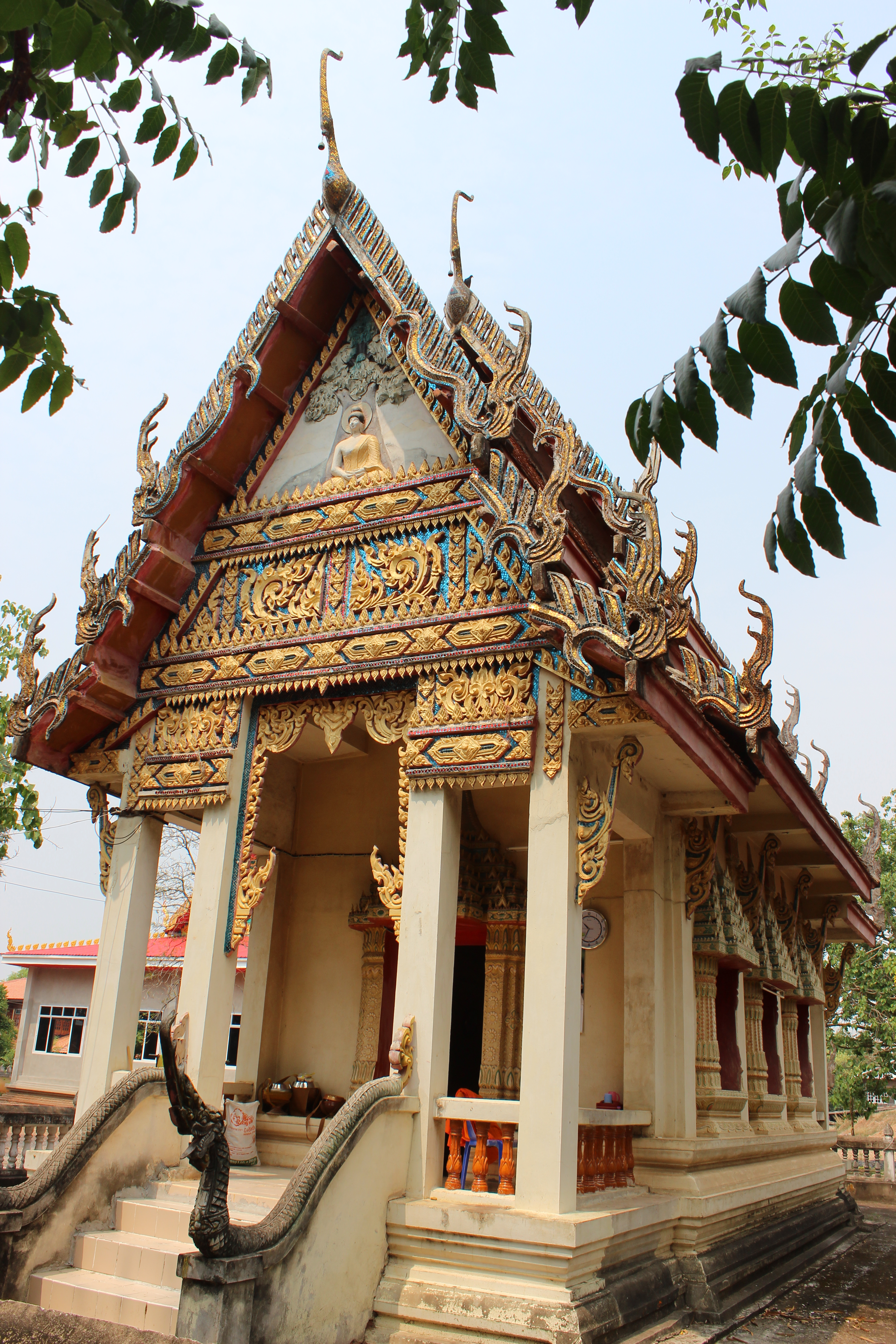 สิมอิสาน (พระอุโบสถ) วัดธาตุ